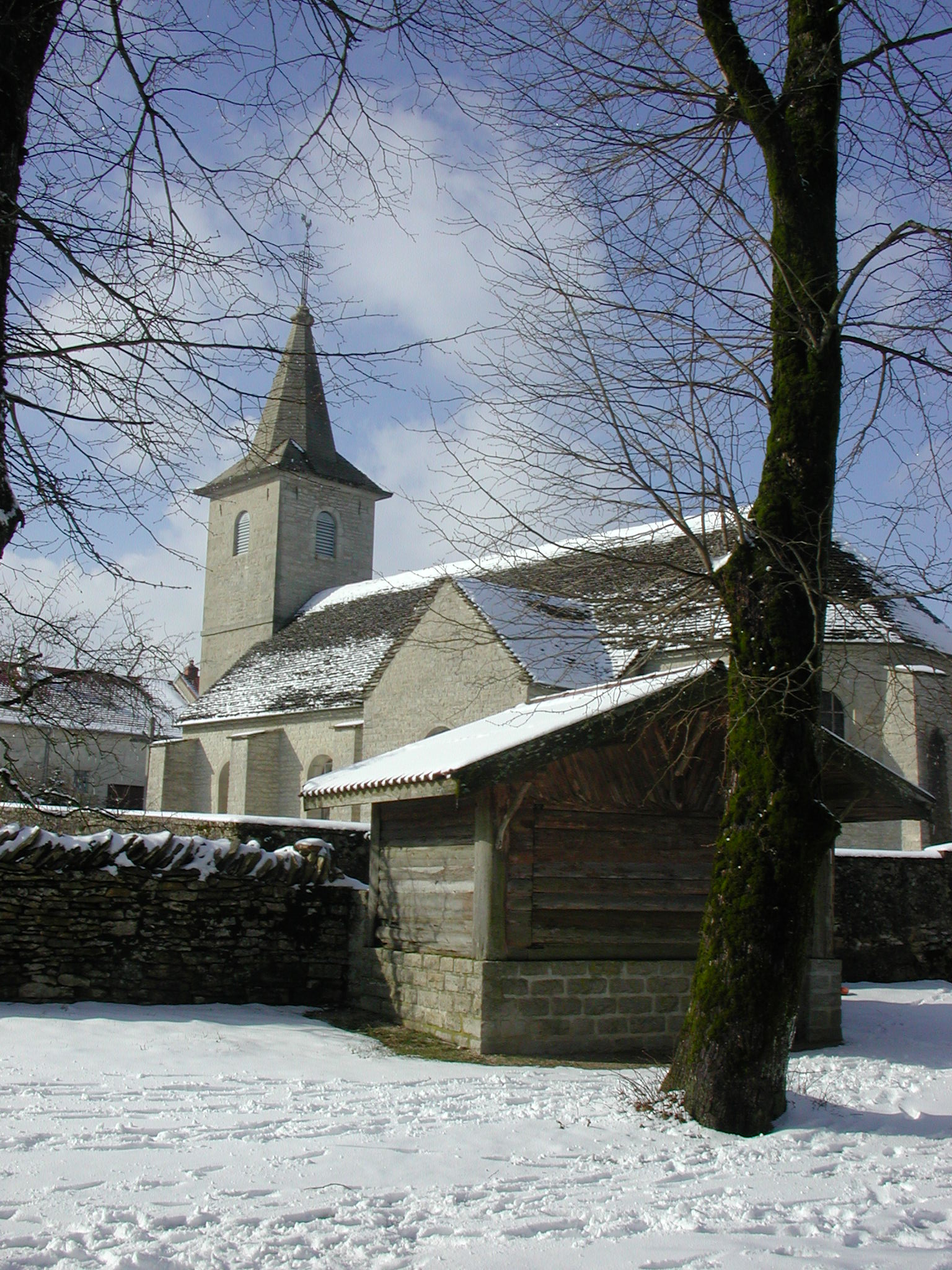 Église de Granges-sur-Baume.